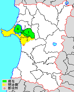 Map of MInamiakita District, Akita, Japan